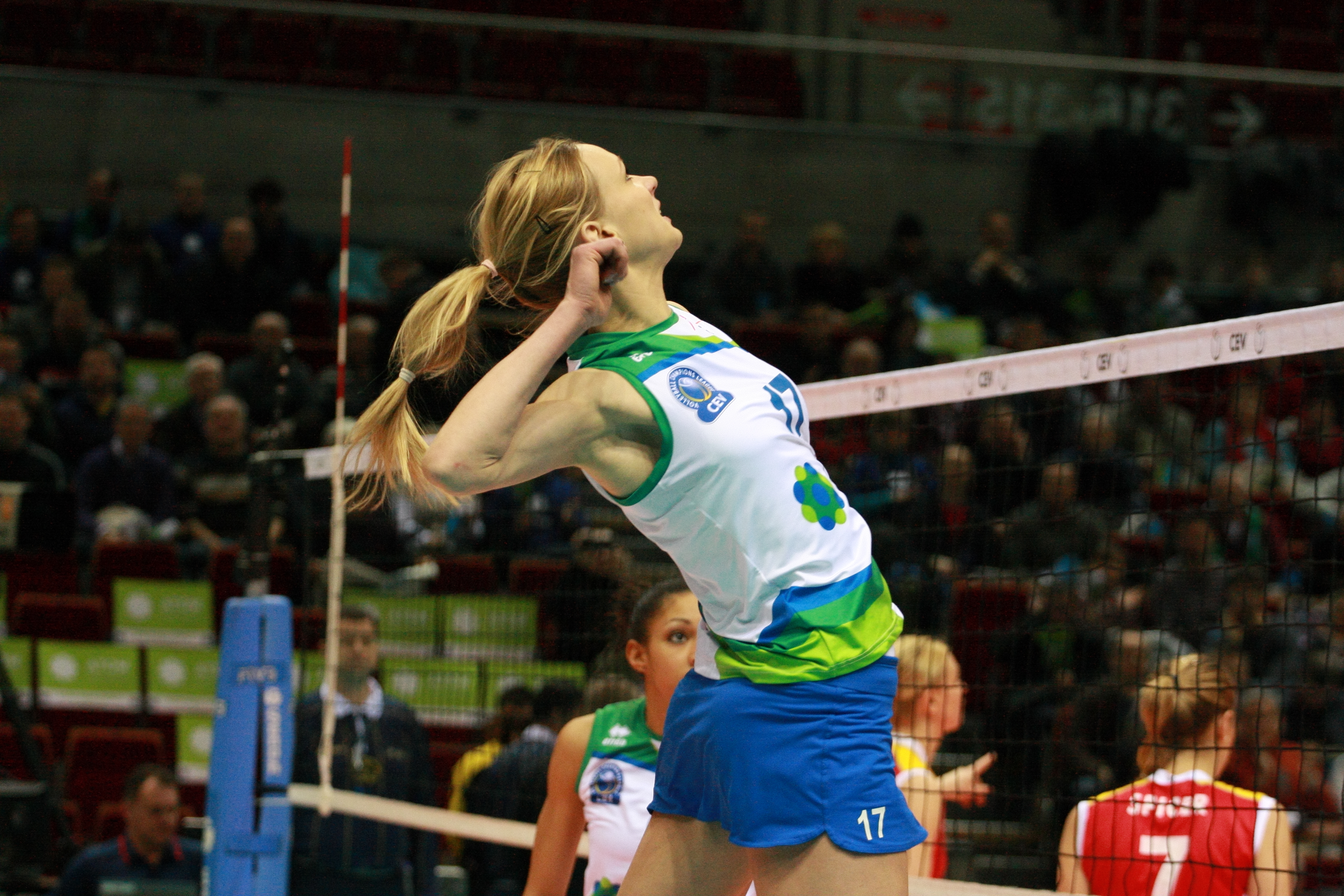 Atom Trefl Sopot vs Rabita Baku